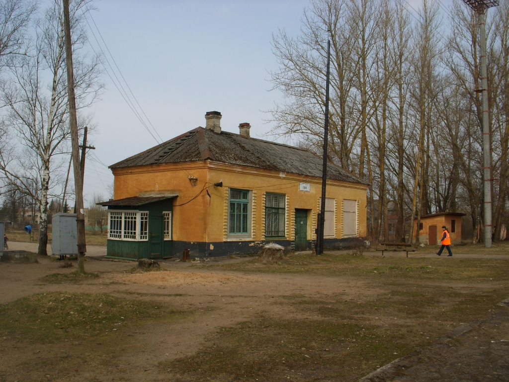 Вокзал в Гдове